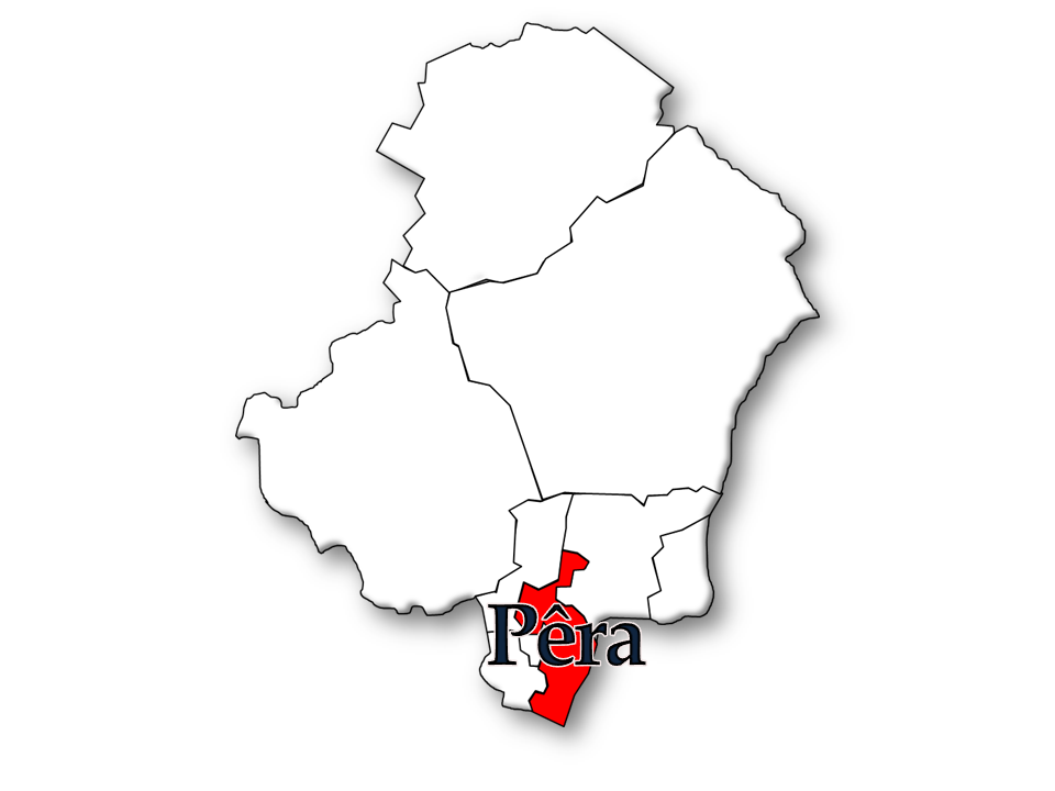 Censos 1864/2011